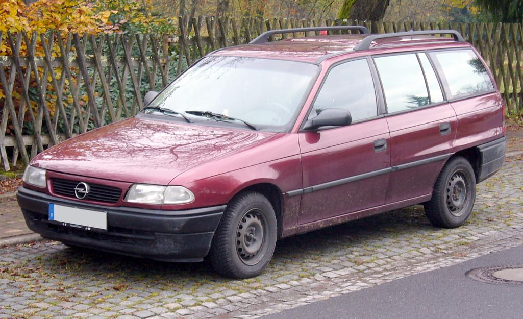 Opel Astra F Caravan